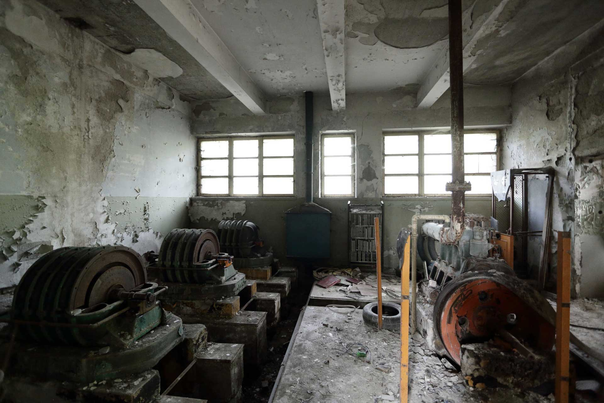 Sala macchine